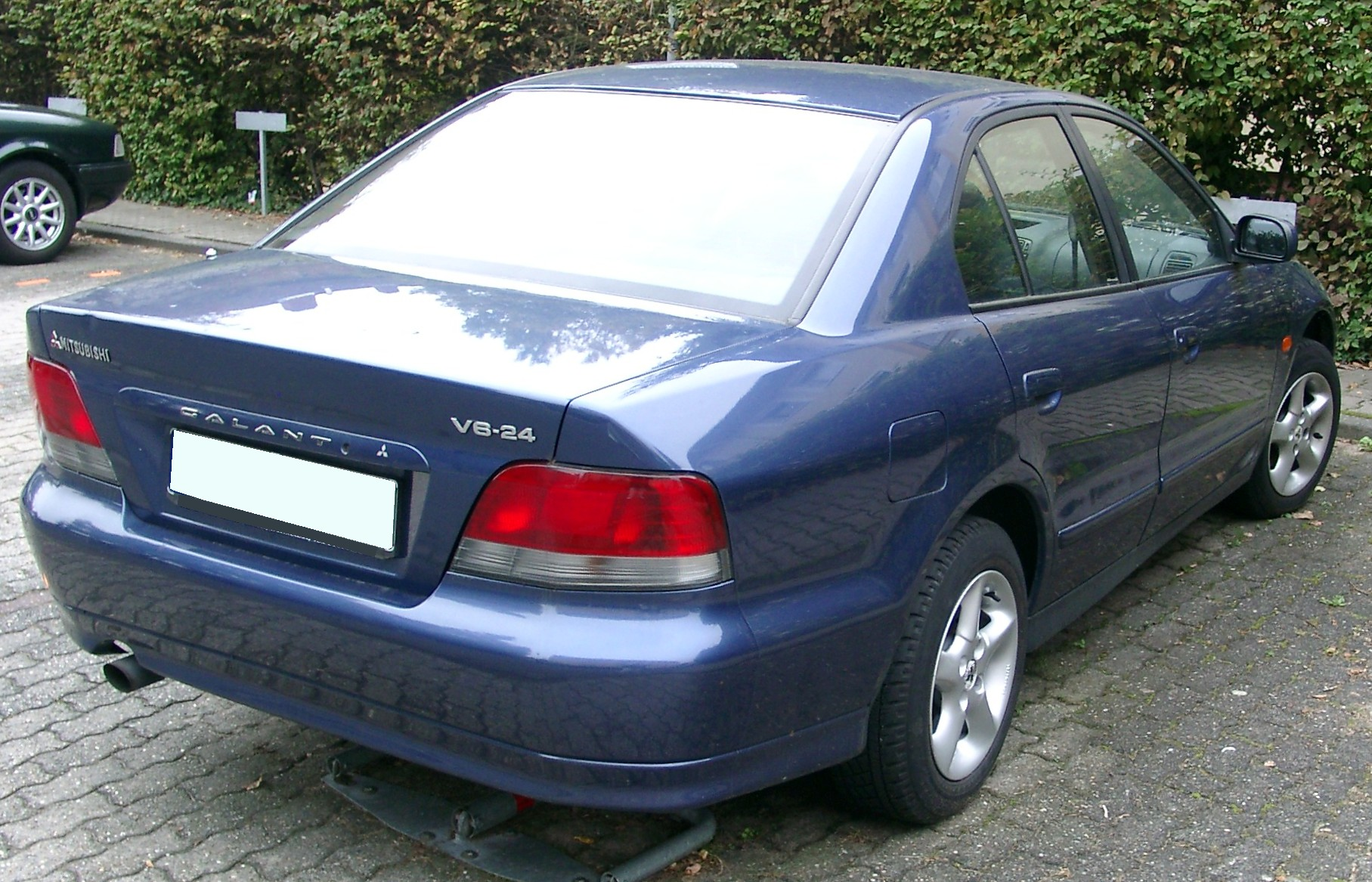 Mitsubishi Galant, 8. Generation